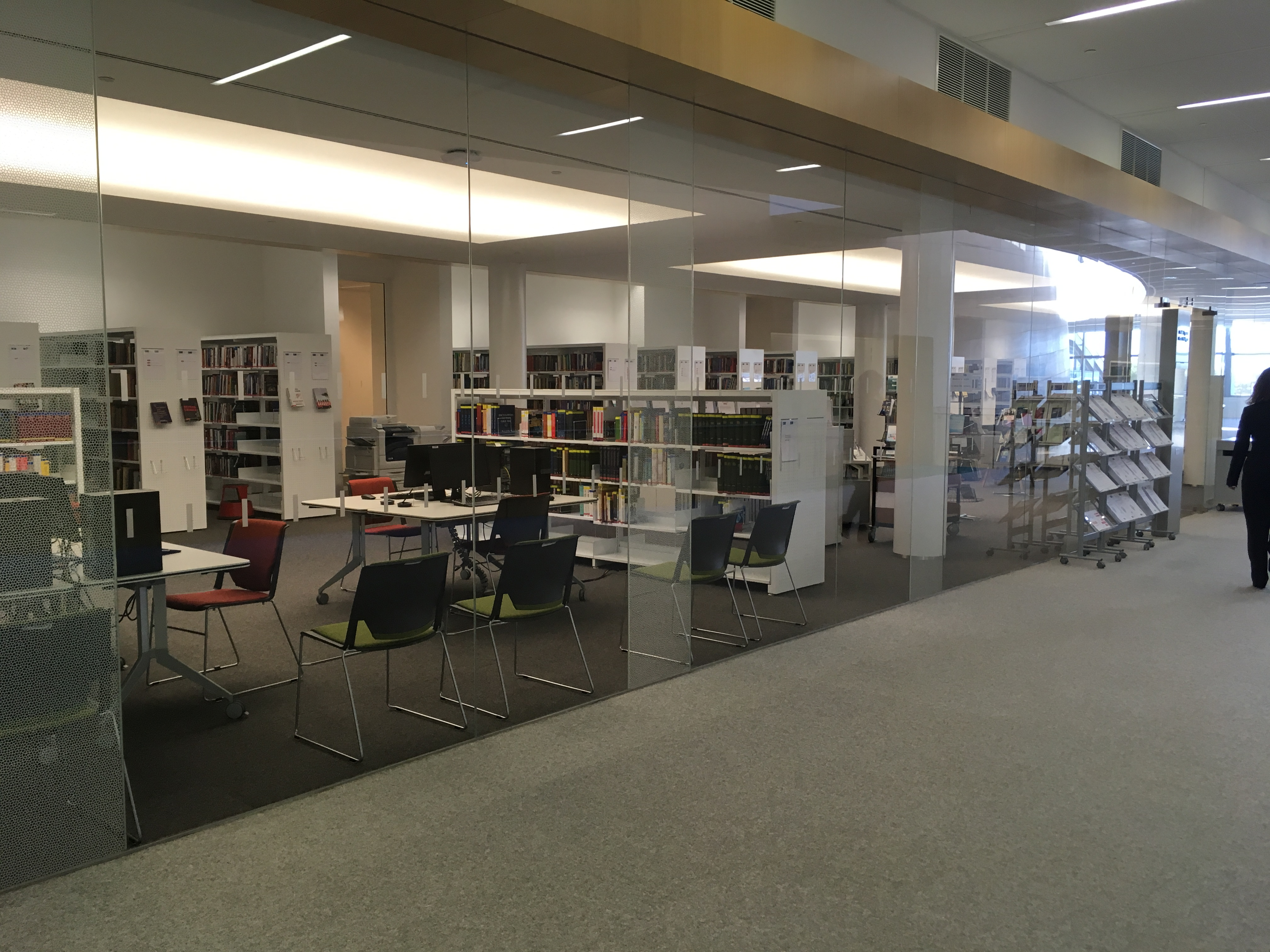 Library in new NATO HQ